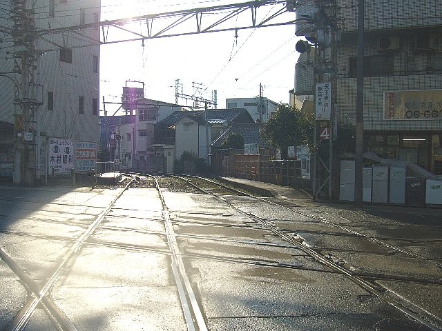 阪堺電気軌道上町線・阪堺線 住吉停留場 上町線（前後）・阪堺線（左右）の平面交差と4番線（右） 住吉公園駅方面を西望